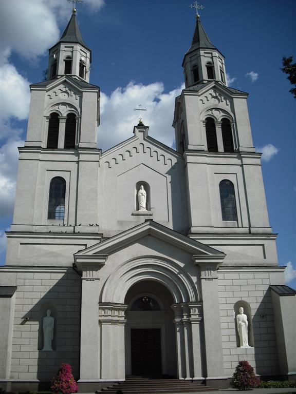 Vilkaviškio Švč. Mergelės Marijos Apsilankymo katedra